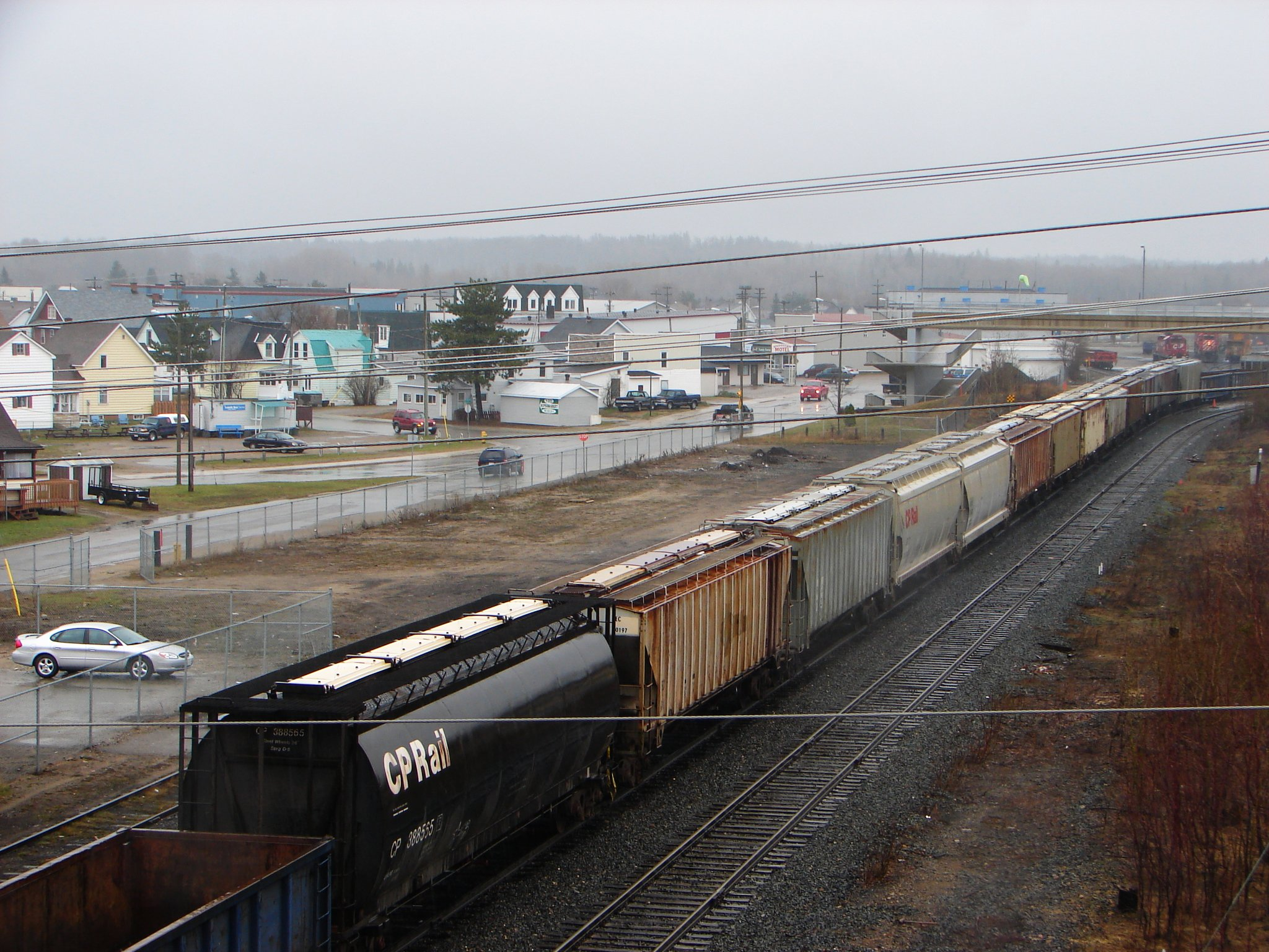 Chapleau, Ontario, Canada